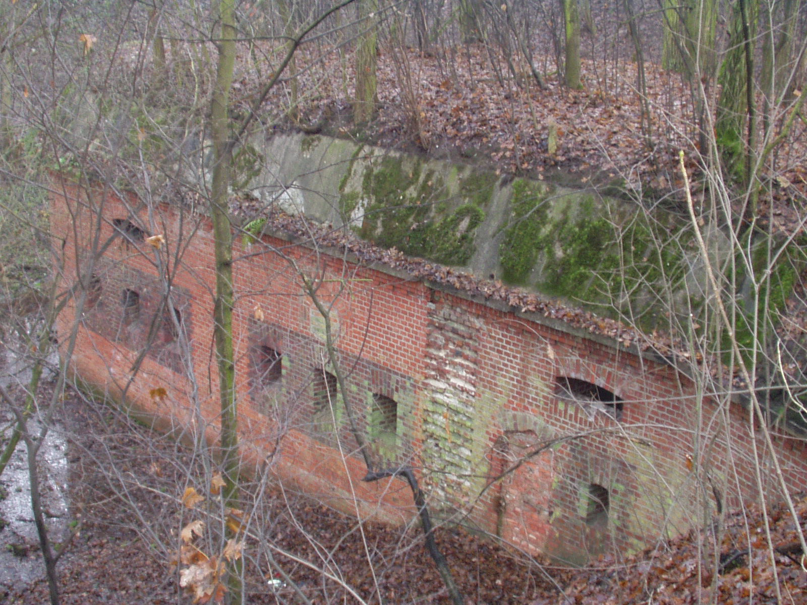 Lewa kaponiera barkowa Fortu XV Twierdzy Toruń